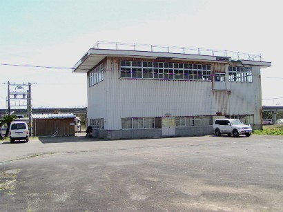 2005年3月31日に投稿者が東都農駅にて撮影。 左が東都農駅の小さな待合所で右は隣接するリニア資料館であります。 リニア資料館の二階部分にドアが見えますがこのままではここから出ることはできません。 実はこの部分には螺旋階段がありこのドアからその階段を経て外に出ることができたがそれが撤去されたという事情があるのです。